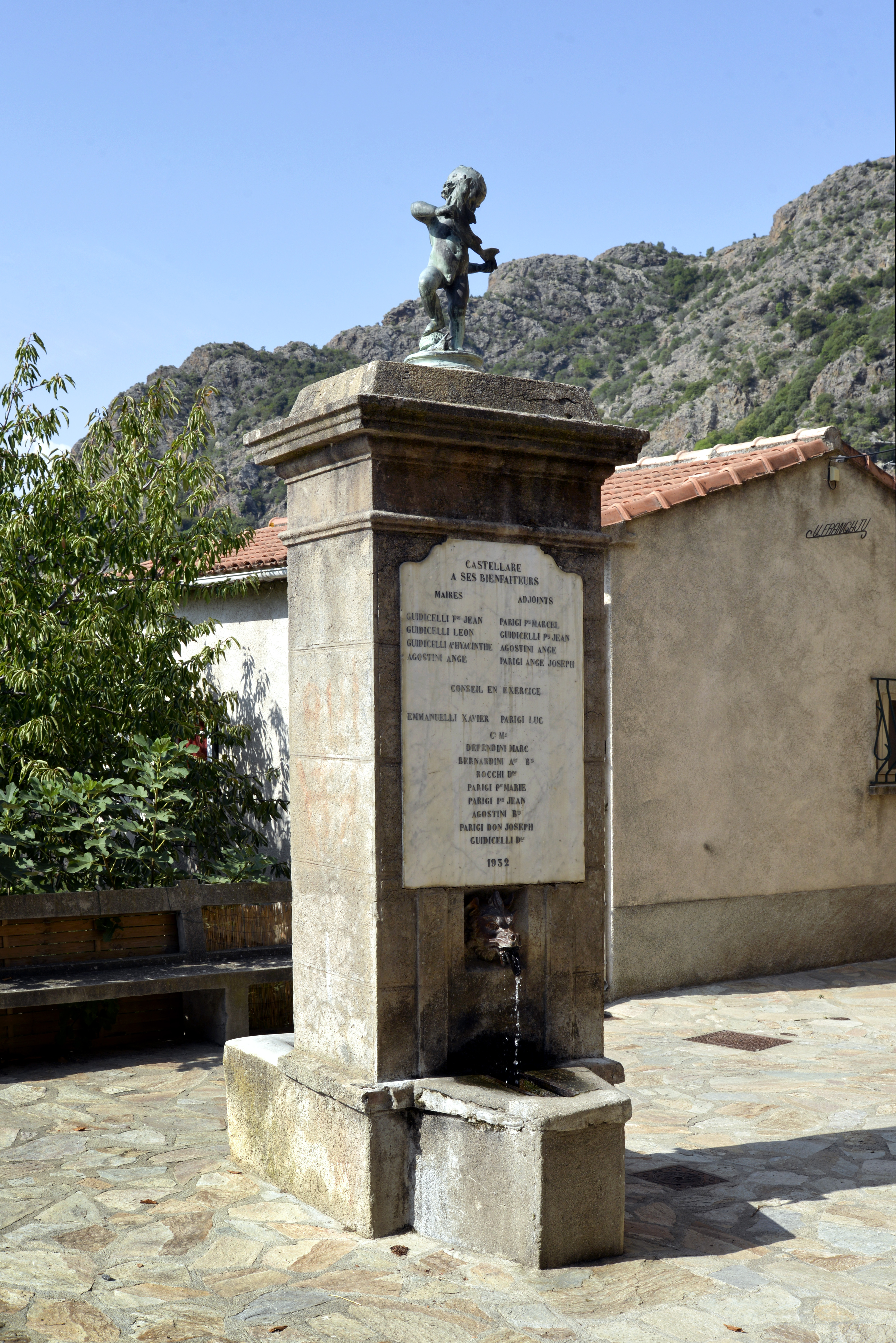 Castellare-di-Mercurio, Bozio (Haute-Corse) - Fontaine Piazza di a funtana (ou de la place Léon Giudicelli, ancien maire), coiffée d'une statue métallique représentant un chérubin tenant un poisson.